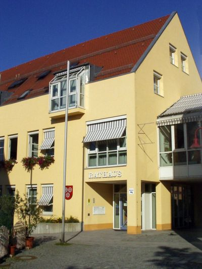 Privataufnahme: Copyright von Herrn Stefan Rieger, Internetbeauftragter der Stadt Aalen, freigegeben.